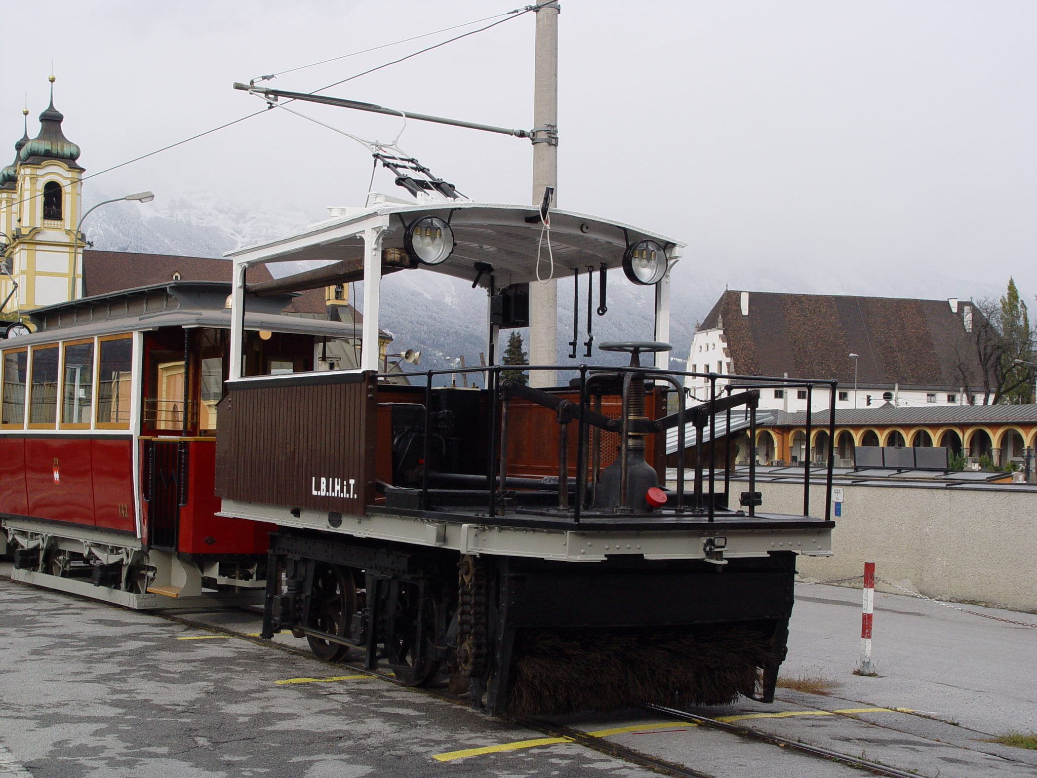 Die Kleine Schneekehre der Localbahn Innsbruck-Hall i. Tirol bei den Tiroler Museumsbahnen